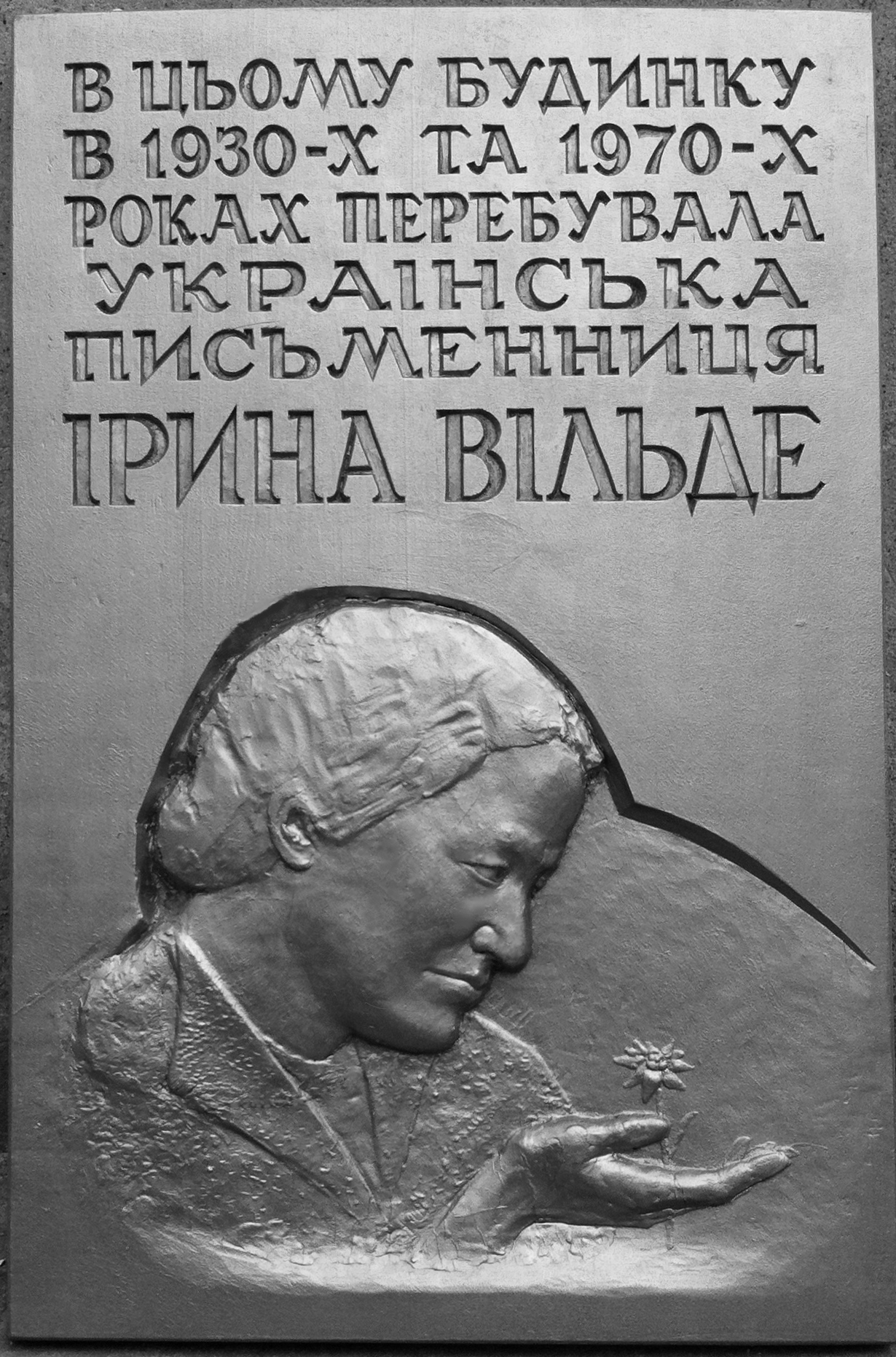 Меморіальна дошка українській письменниці Ірині Вільде на будівлі Літературного музею Прикарпаття в м. Івано-Франківську. Автор - Орест Івасюта. Дата створення: 1989 рік.